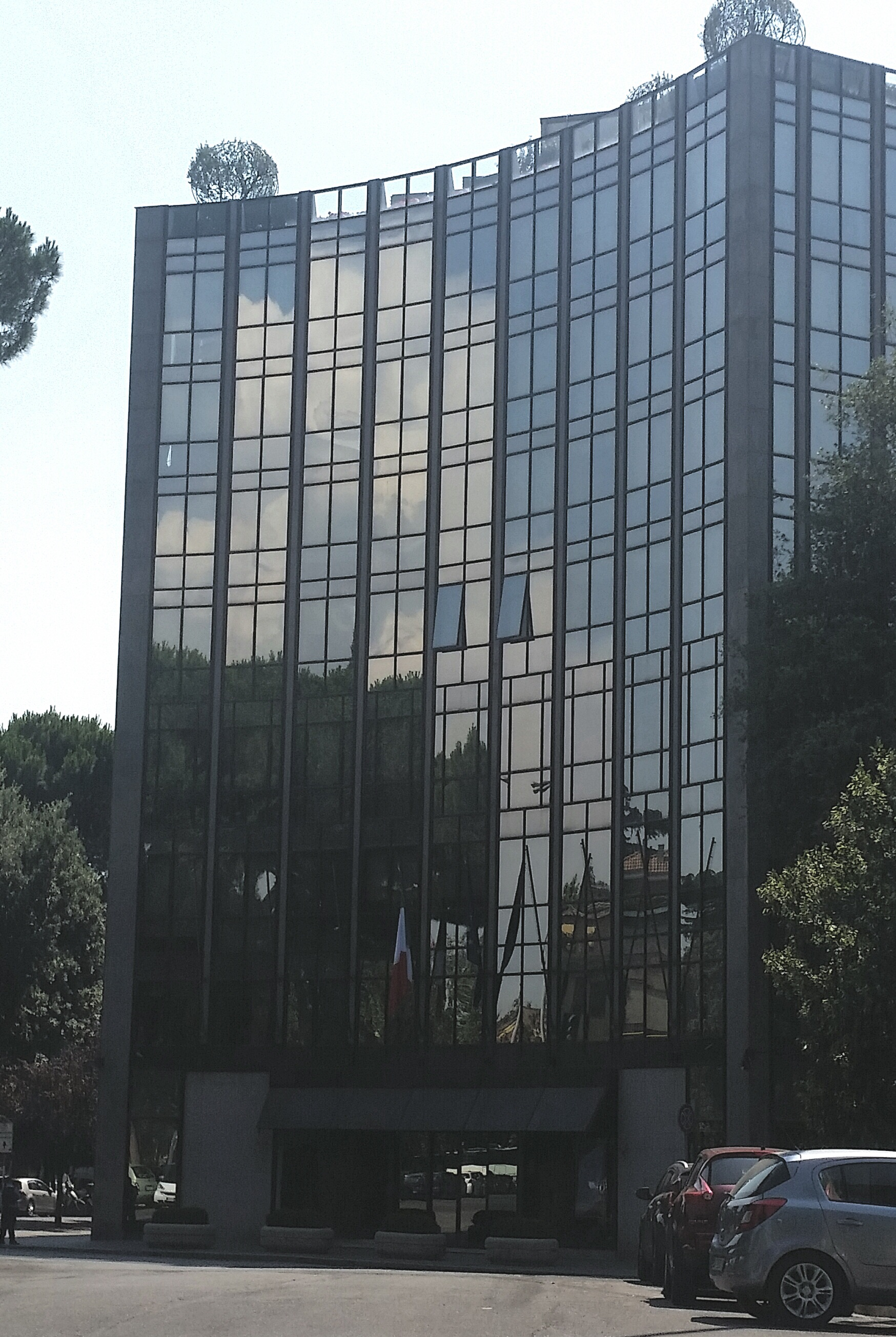 Sede centrale Finmeccanica a Roma, piazza Montegrappa.